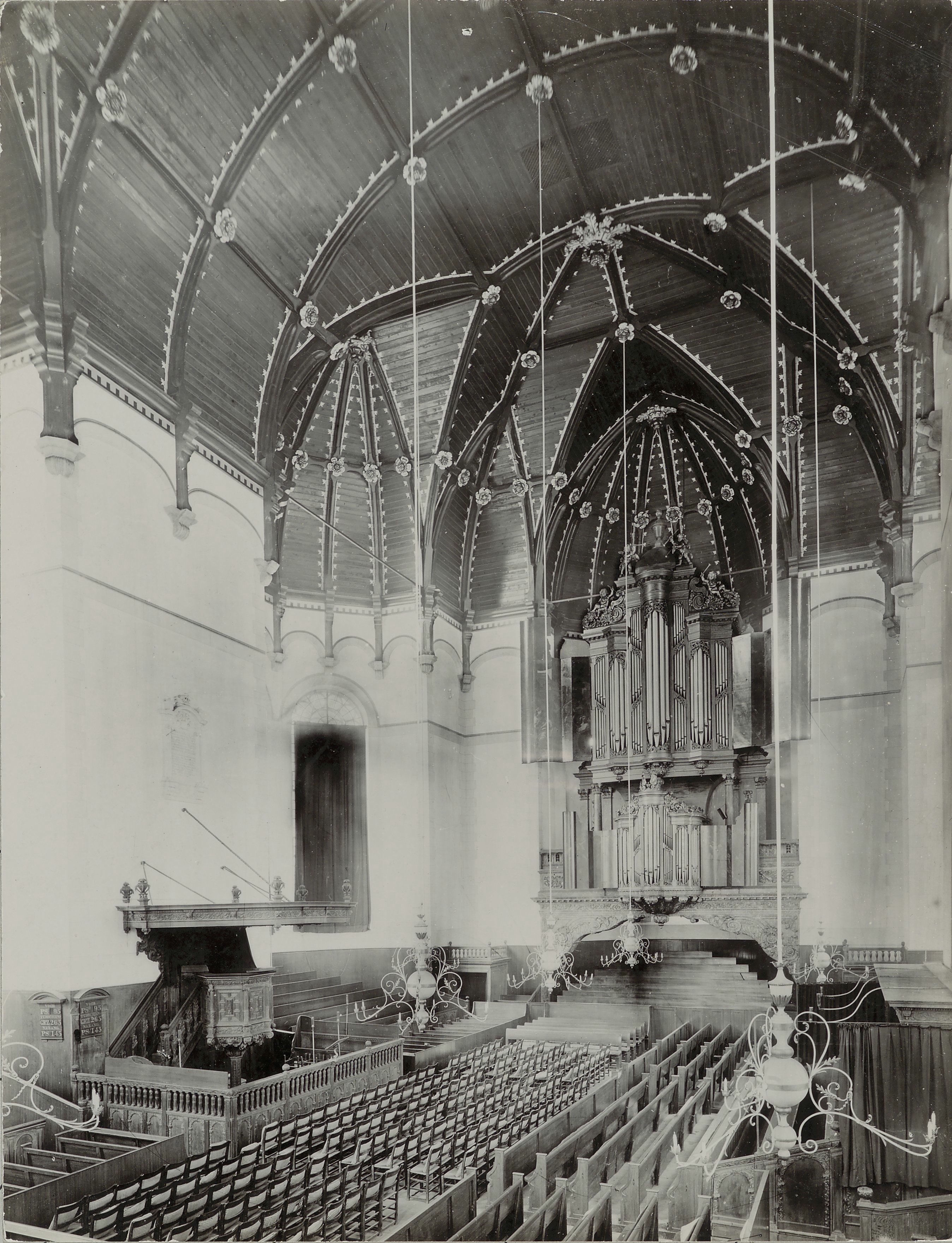 Hervormde Nieuwe kerk: Interieur hervormde kerk gezien naar het westen (opmerking: Zie ook neg 37.702)